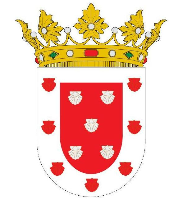 Sello de Santiago, Rep Dom